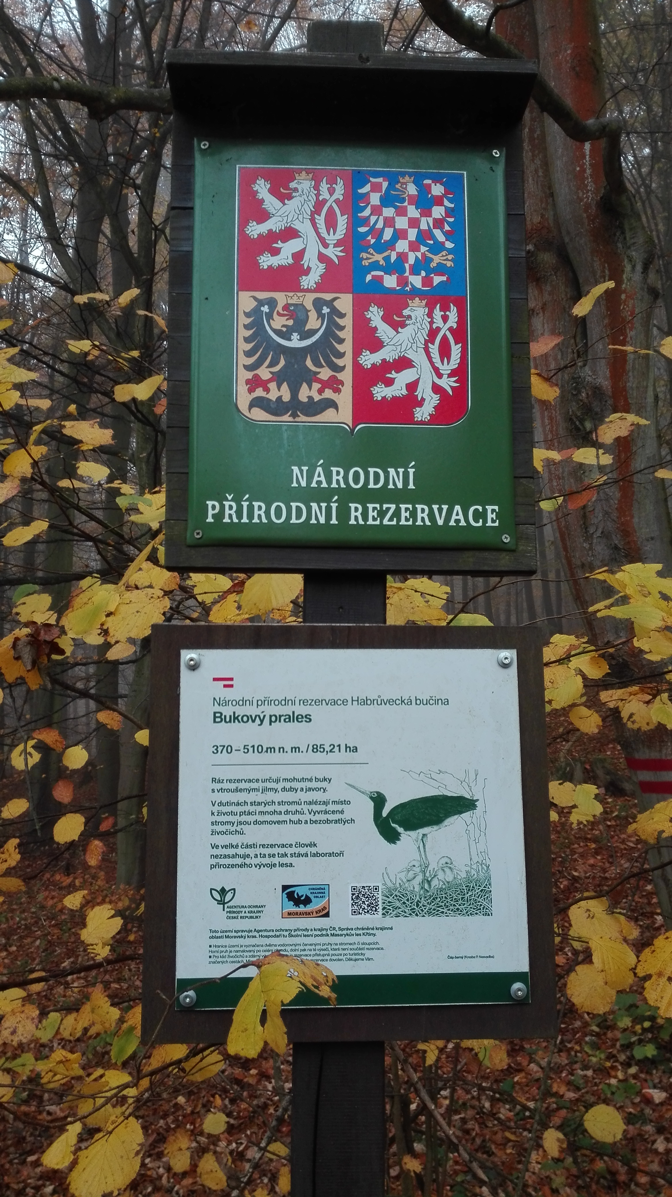 Národní přírodní rezervace Habrůvecká bučina